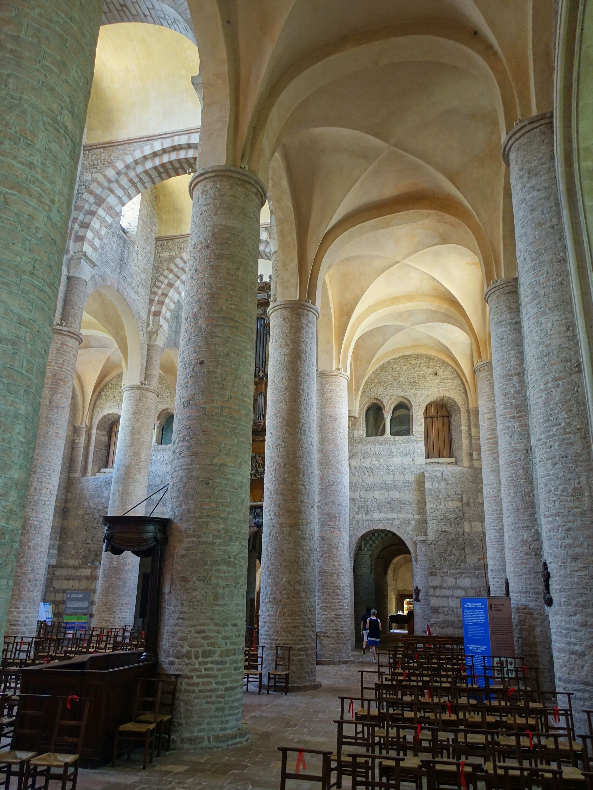 Saint-Philibert de Tournus, Hauptschiff und nördliches Seitenschiff nach Westen